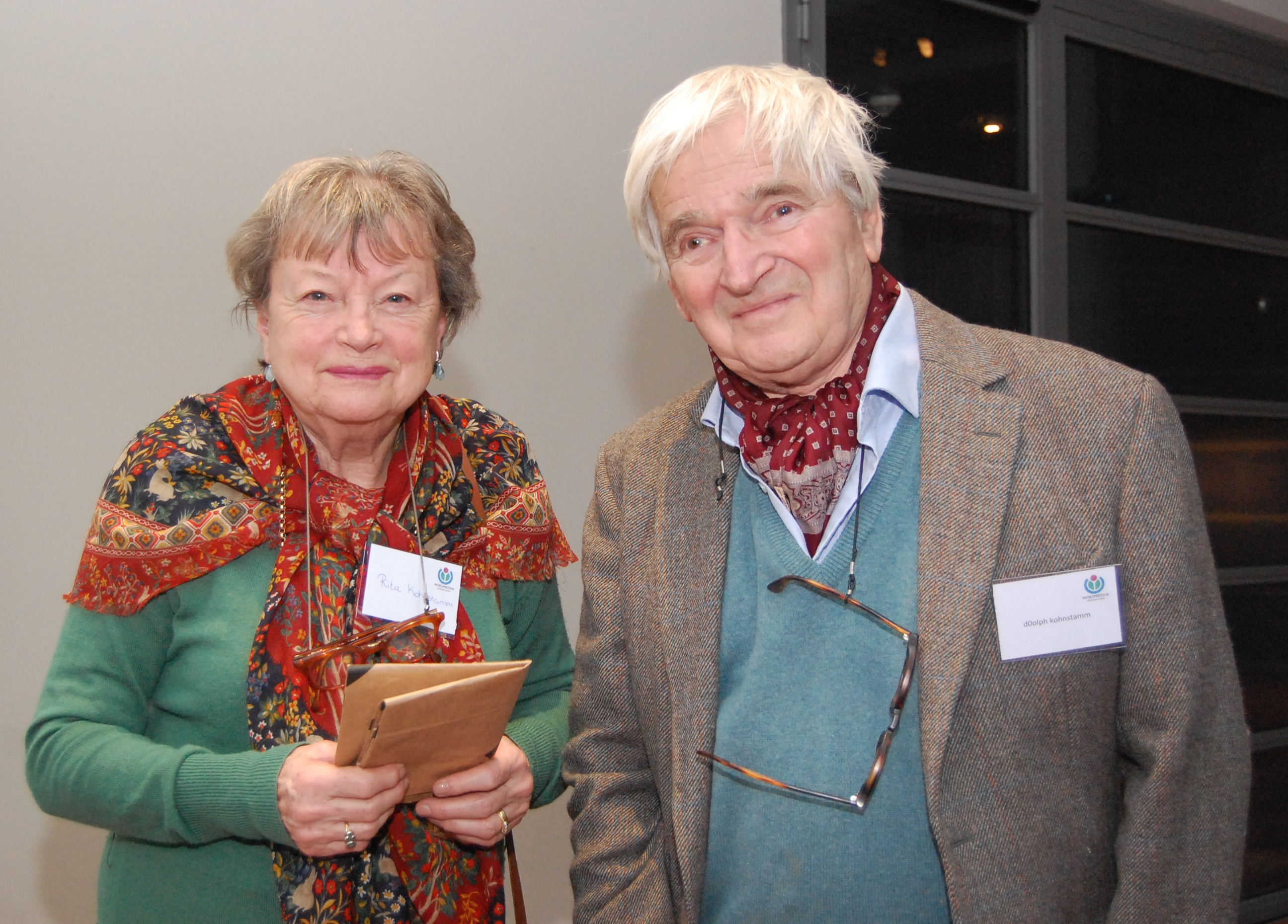 Nieuwjaarsbijeenkomst Wikimedia Nederland 21 januari 2017 Museum Volkenkunde Leiden. Rita en Dolph Kohnstamm